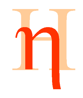 Greek letter